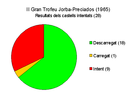 Estadística dels 28 castells intentats al II Gran Trofeu Jorba-Preciados, celebrat el 26 de setembre de 1965 a l'Avinguda del Portal de l'Àngel de Barcelona.